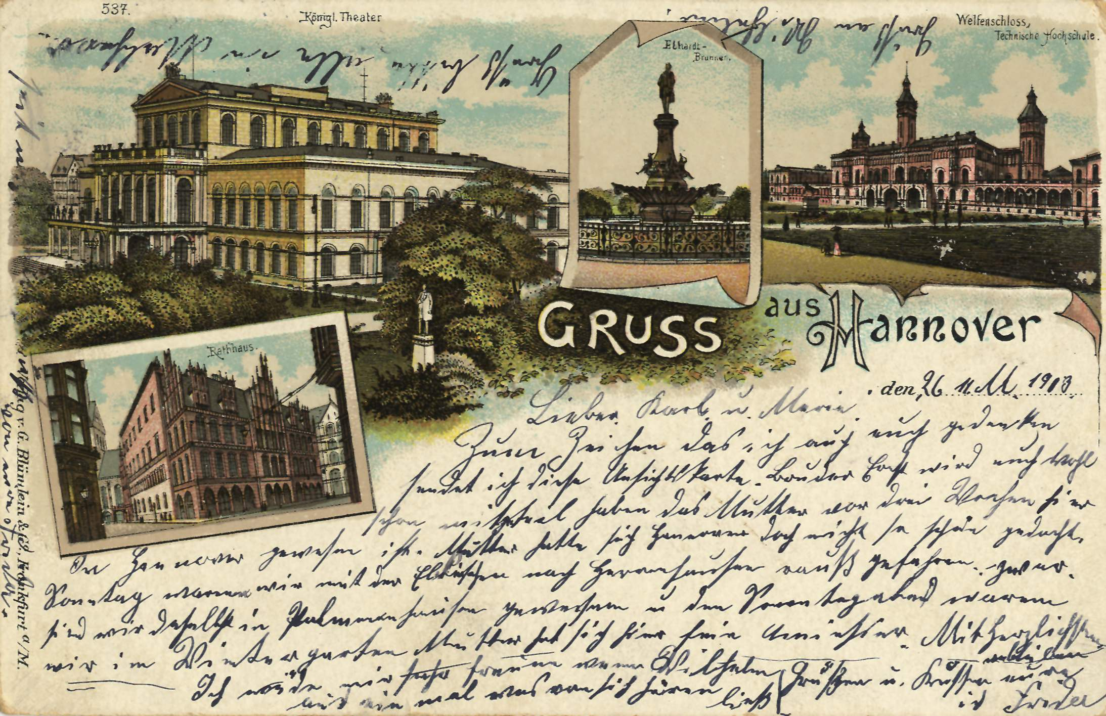 Lithografierte Mehrbildkarte aus dem "Verlag von Gerhard Blümlein & Co., Frankfurt a / M. ...